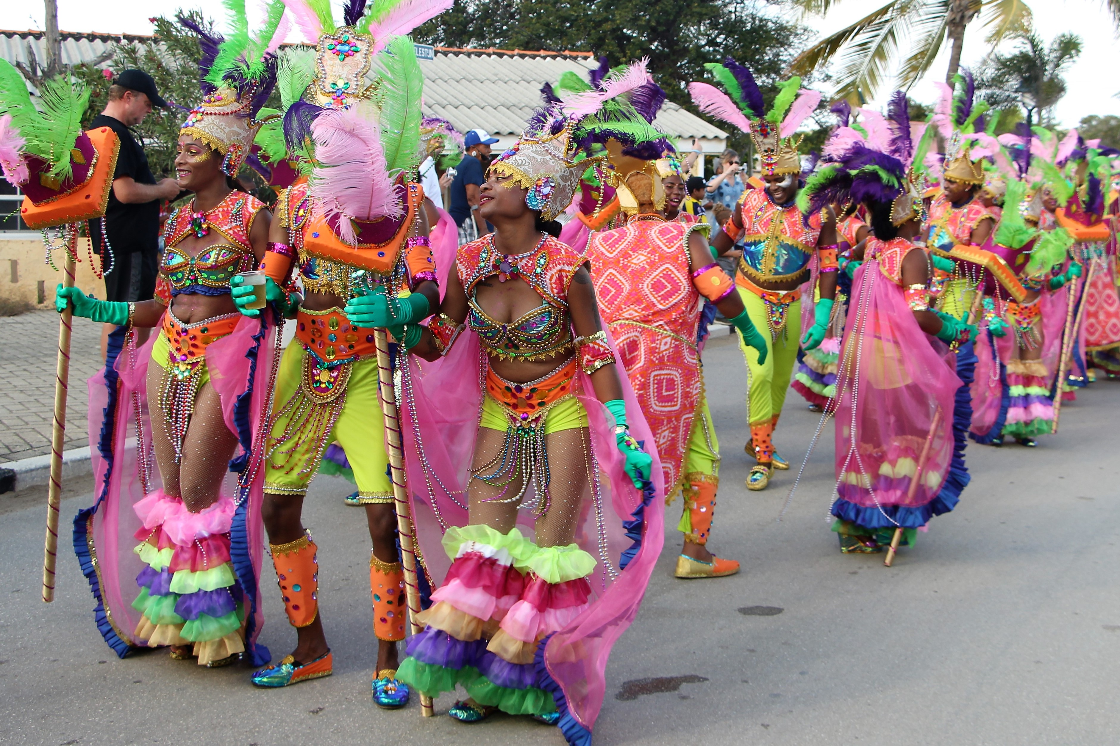 Carnavalsoptocht op Bonaire.